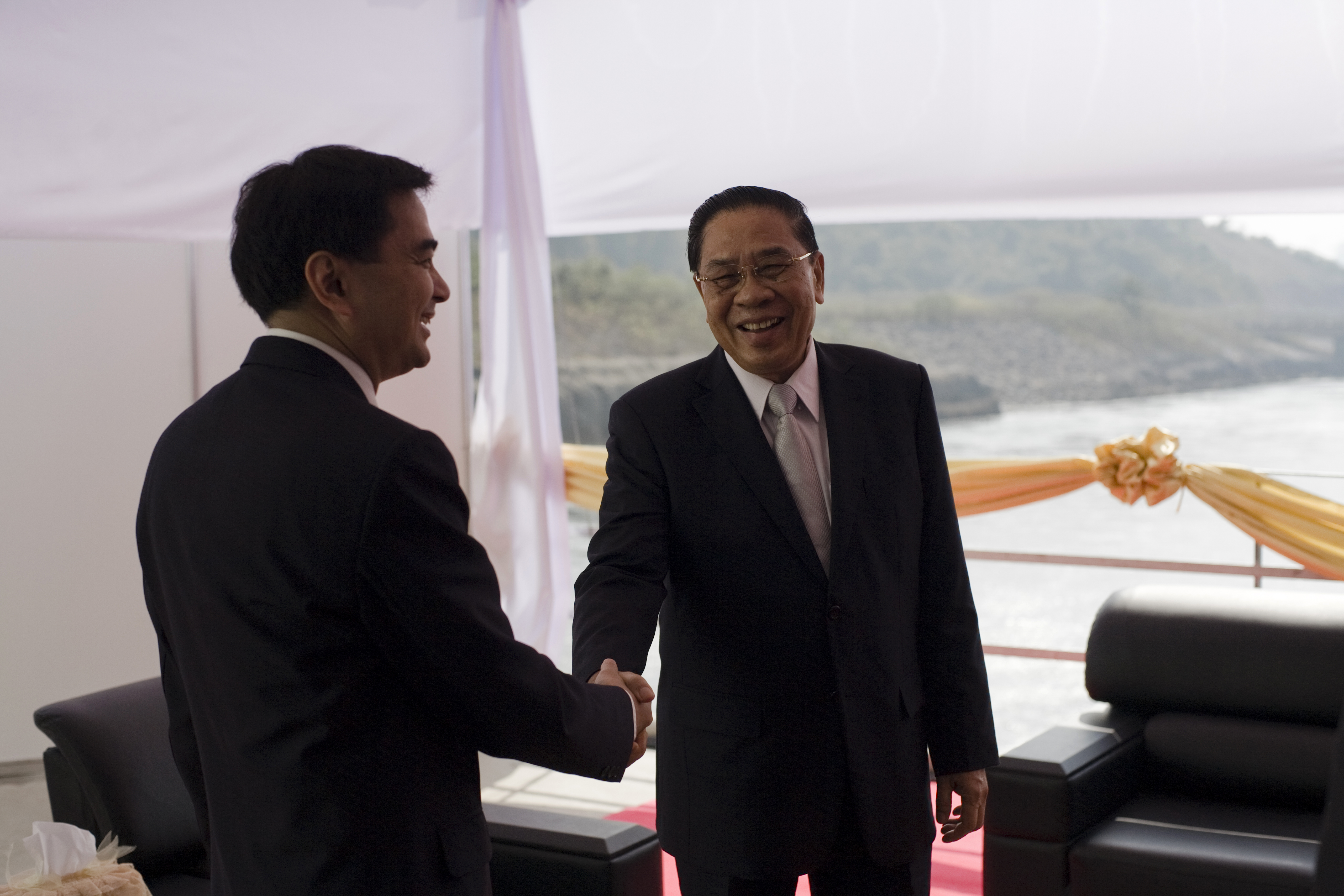 นายกรัฐมนตรีเข้าร่วมพิธีเปิดโครงการอเนกประสงค์น้ำเทิน 2 อย่างเป็นทางการ ณ แขวงคำม่วน สาธารณรัฐประชาธิปไตยประชาชนลาว วันพฤหัสบดี ที่ 9 ธันวาคม พ.ศ.2553 (Photographer attached to the Prime Minister of the Kingdom of Thailand : Peerapat Wimolrungkarat / พีรพัฒน์ วิมลรังครัตน์) @is50mm